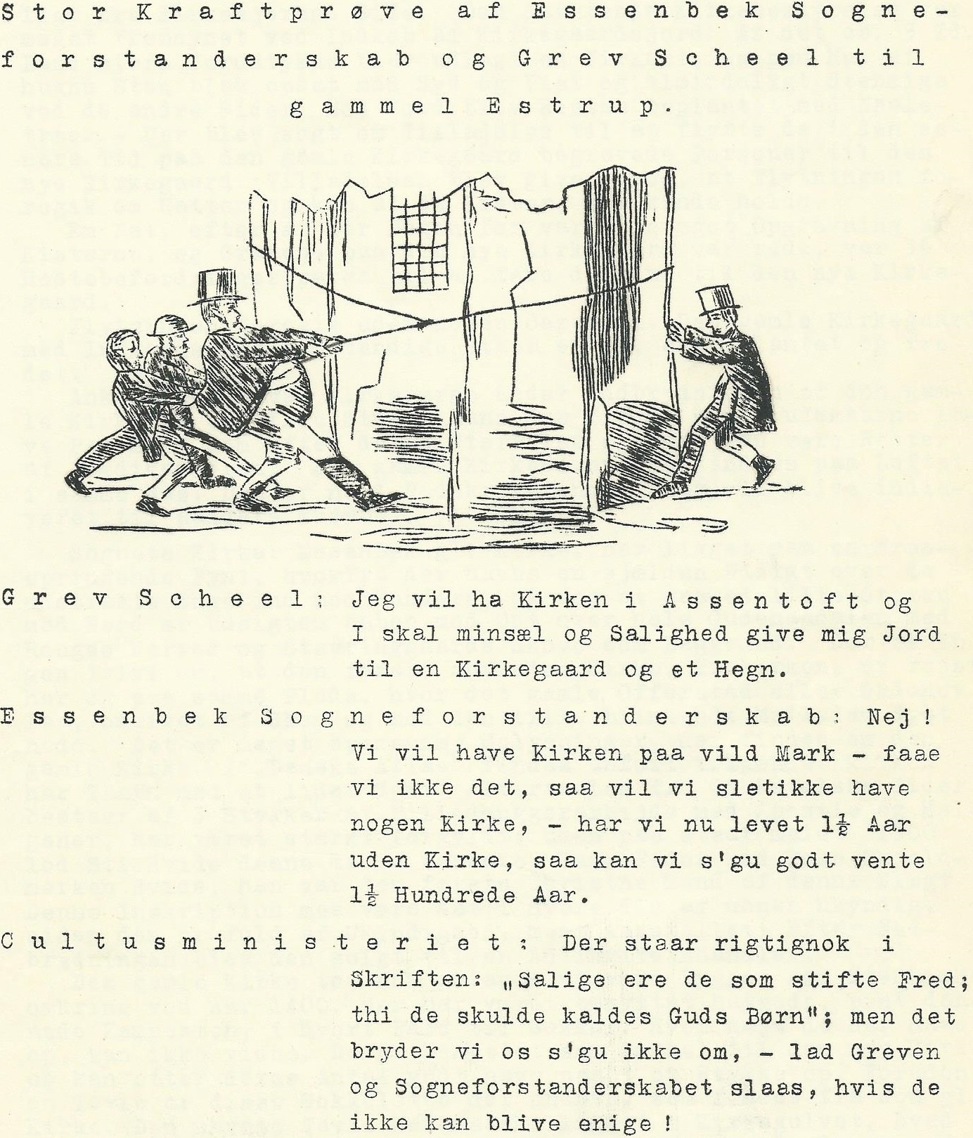 Karikatur af debatten om placeringen af Essenbæk Kirke.